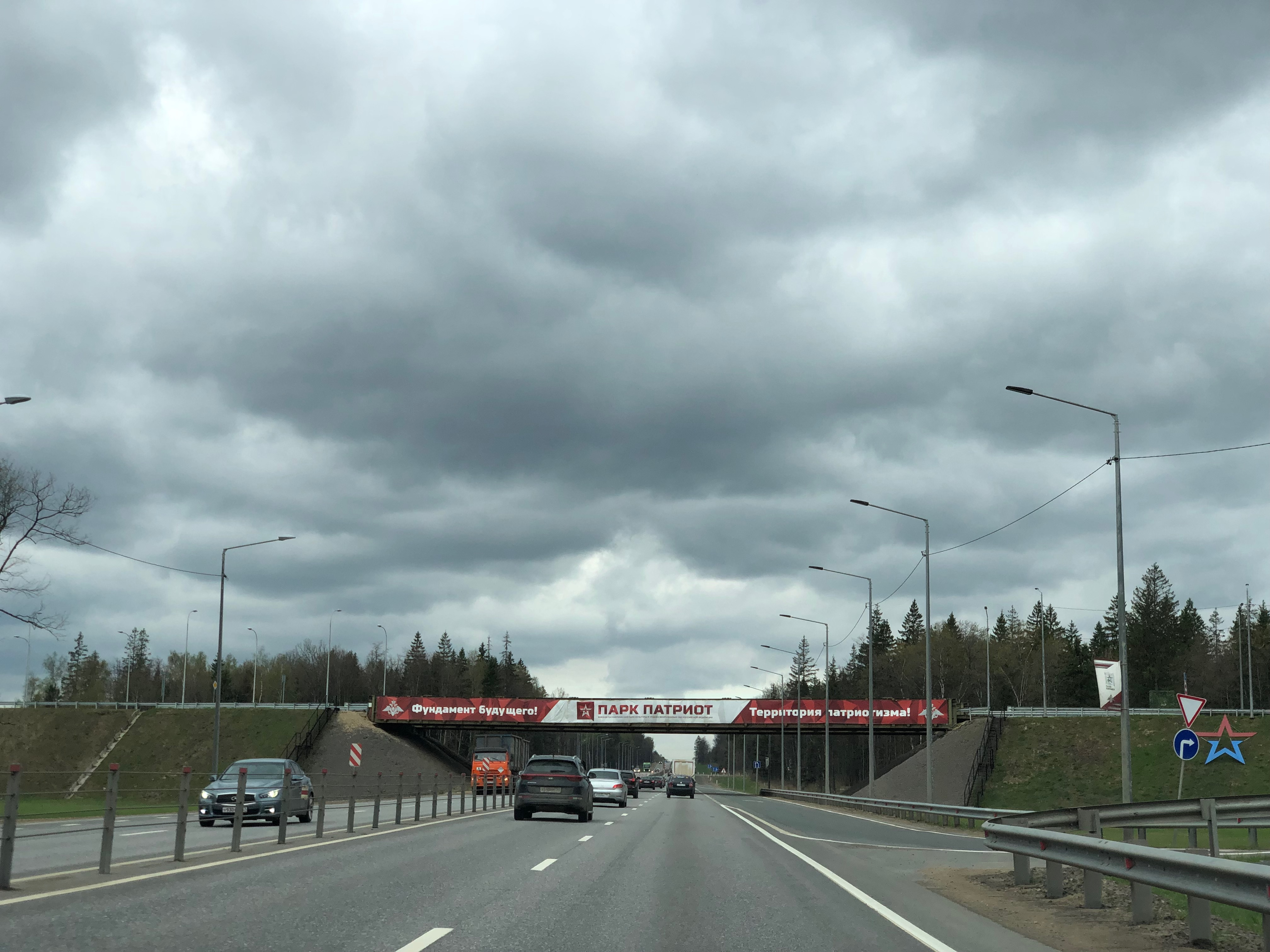 Минское шоссе